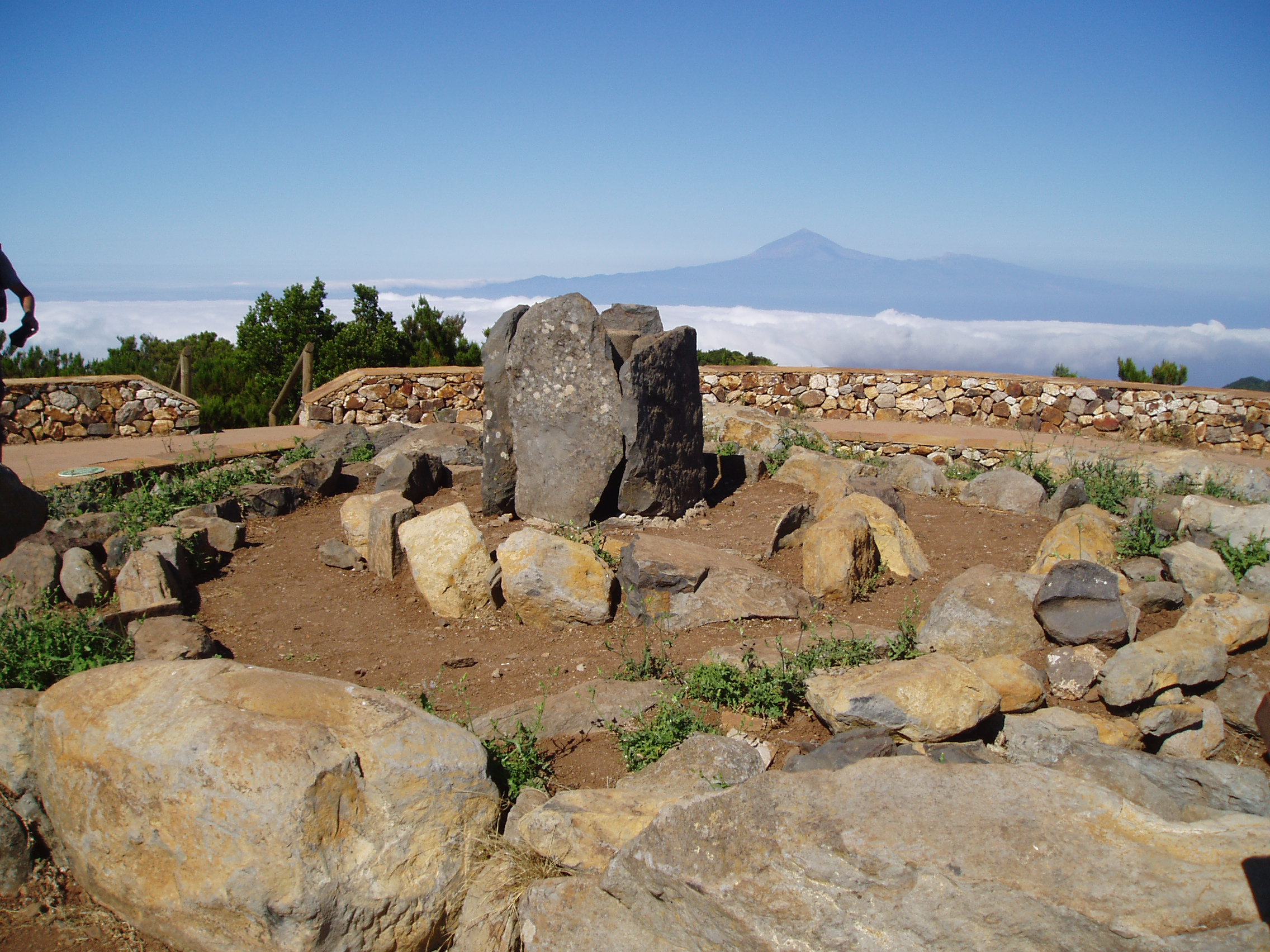 Cima del monte Garajonay en la isla de la Gomera (islas canarias), se observa la reconstrución de un santuario Guanche (antiguos pobladores de canarias) y el volcán Teide al fondo, en la isla de Tenerife La foto fue tomada con cámara digital sin tripode. Cardenasg 15:29, 25 August 2006 (UTC)